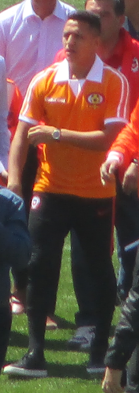 Imágen de Alexis Sánchez con la camiseta conmemorativa de los 40 años de Cobreloa.